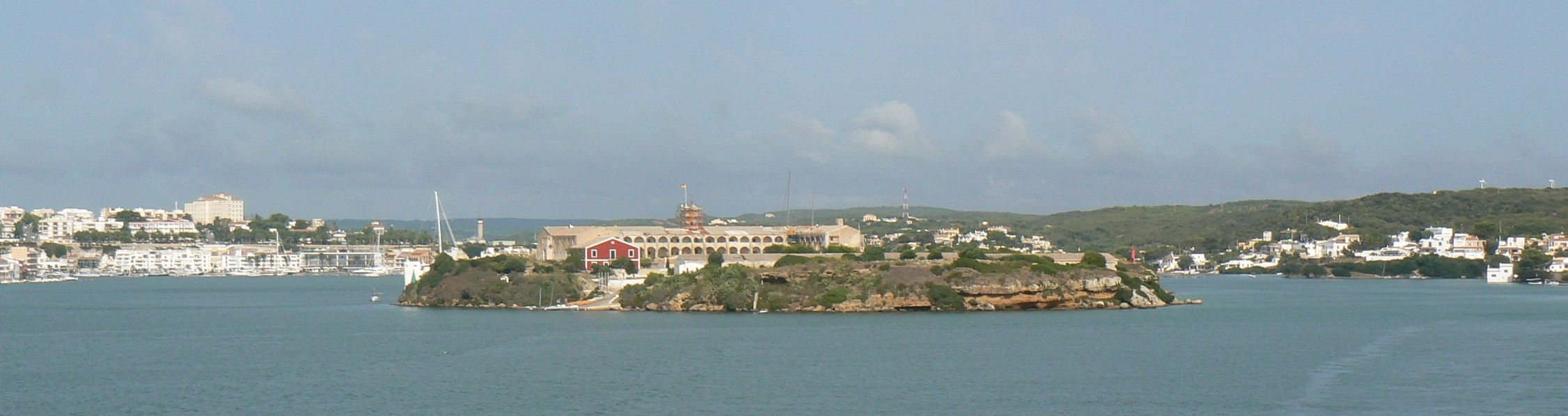 Vista de l'illa del Rei al mig del port de Maó (Menorca).